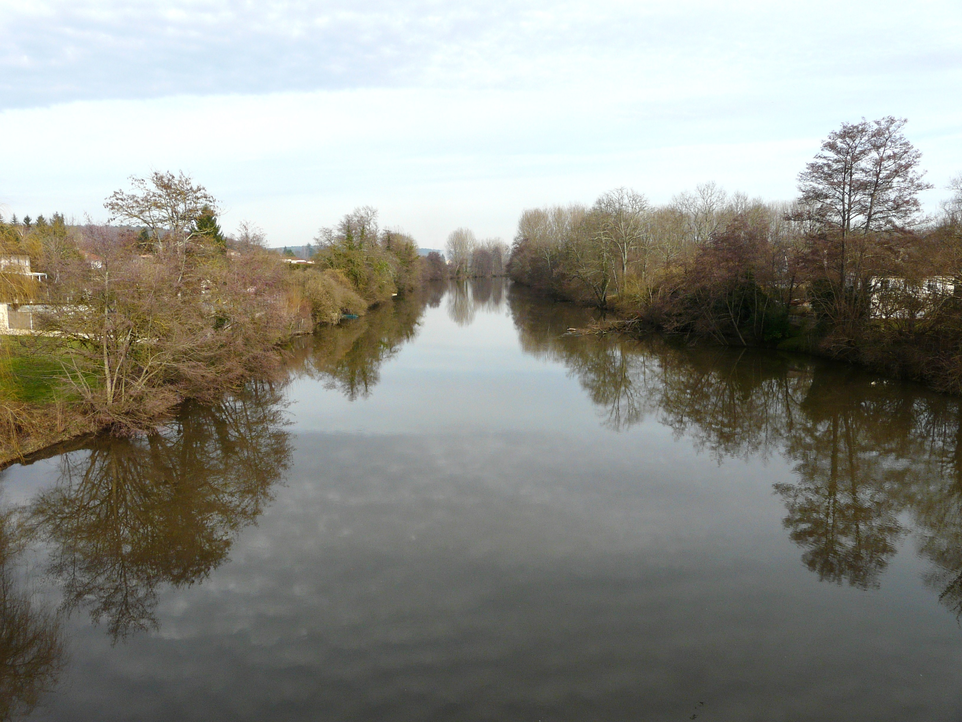 L'Isle en amont du pont de la RD 3A6 entre Annesse-et-Beaulieu (à gauche) et Razac-sur-l'Isle (à droite), Dordogne, France.